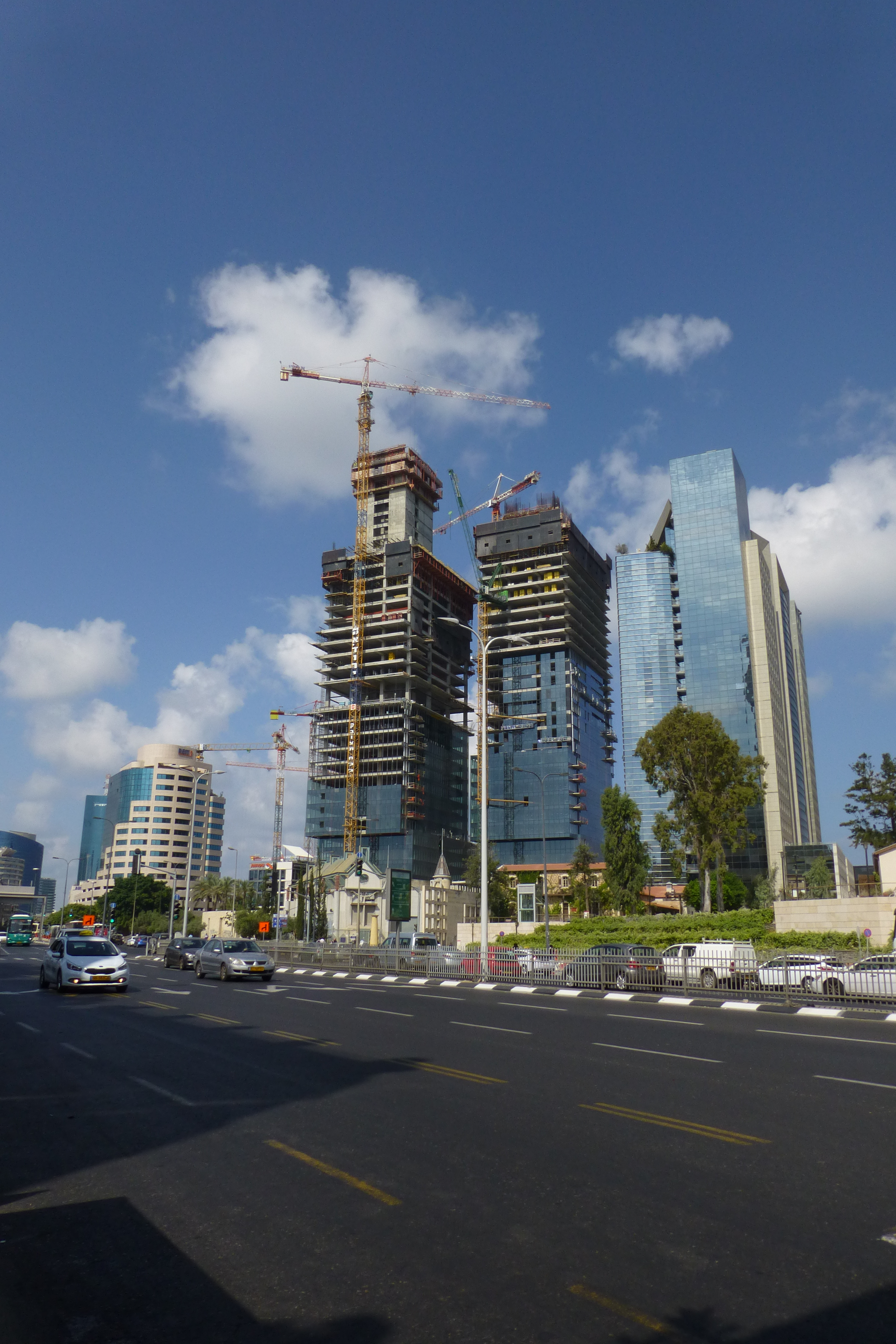 שׂרונה היא המושבה הרביעית שהקימו הגרמנים הטמפלרים בארץ ישראל במחצית השנייה של המאה ה-19. המושבה הוקמה ארבעה קילומטרים צפונית ליפו, ואחרוני בתיה שוכנים כיום בתל אביב בין שדרות שאול המלך מצפון, דרך בגין במזרח, רחוב הארבעה מדרום, ומגרשי החנייה של אחוזות החוף ממערב. מקצתם נמצאים היום בתוך בסיס הקריה.